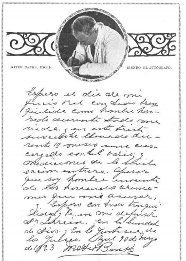 Foto de Mateo Banks y el autógrafo proporcionado a la revista Caras y Caretas en 1923, con motivo de una entrevista.